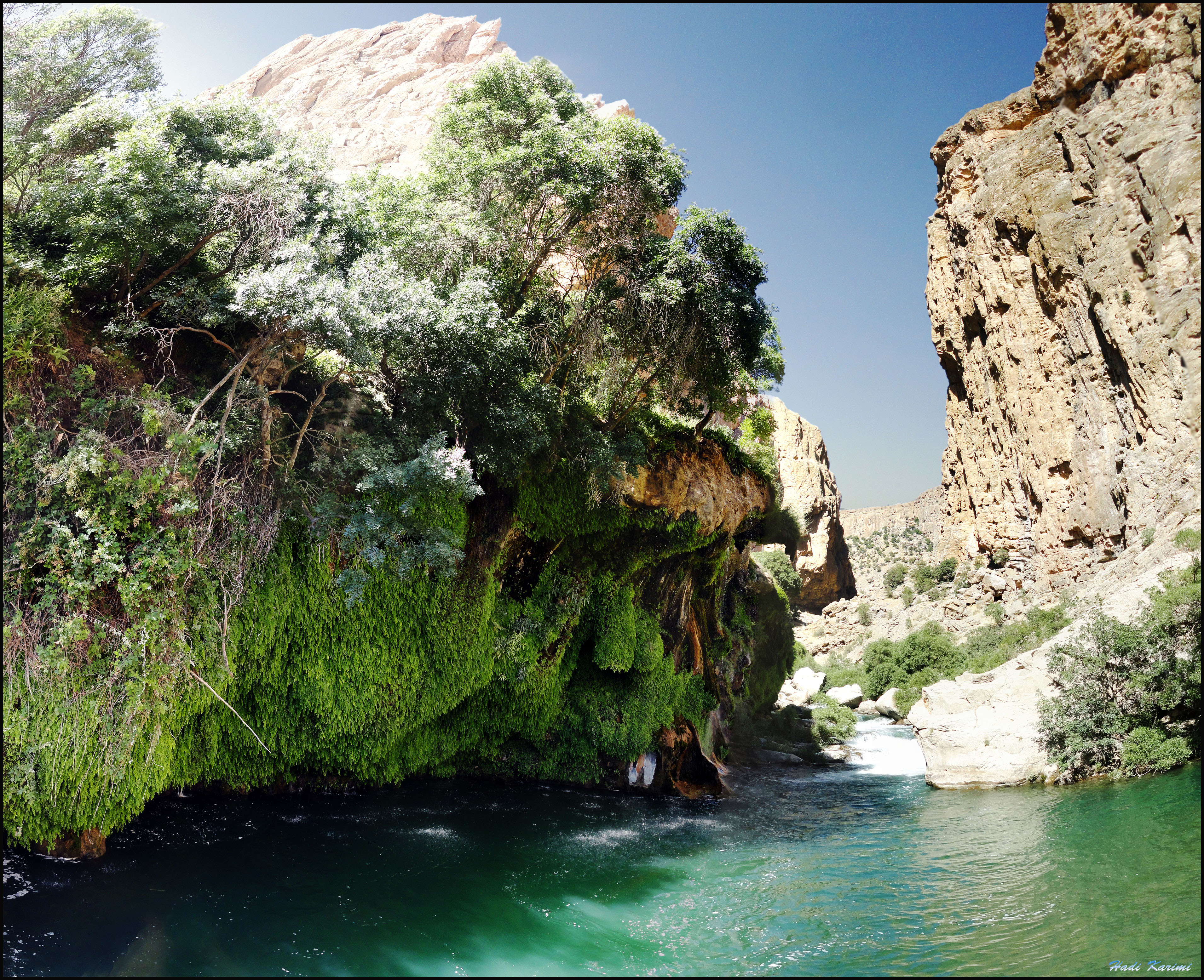 Tange Boragh (Boragh canyon) تنگ براق